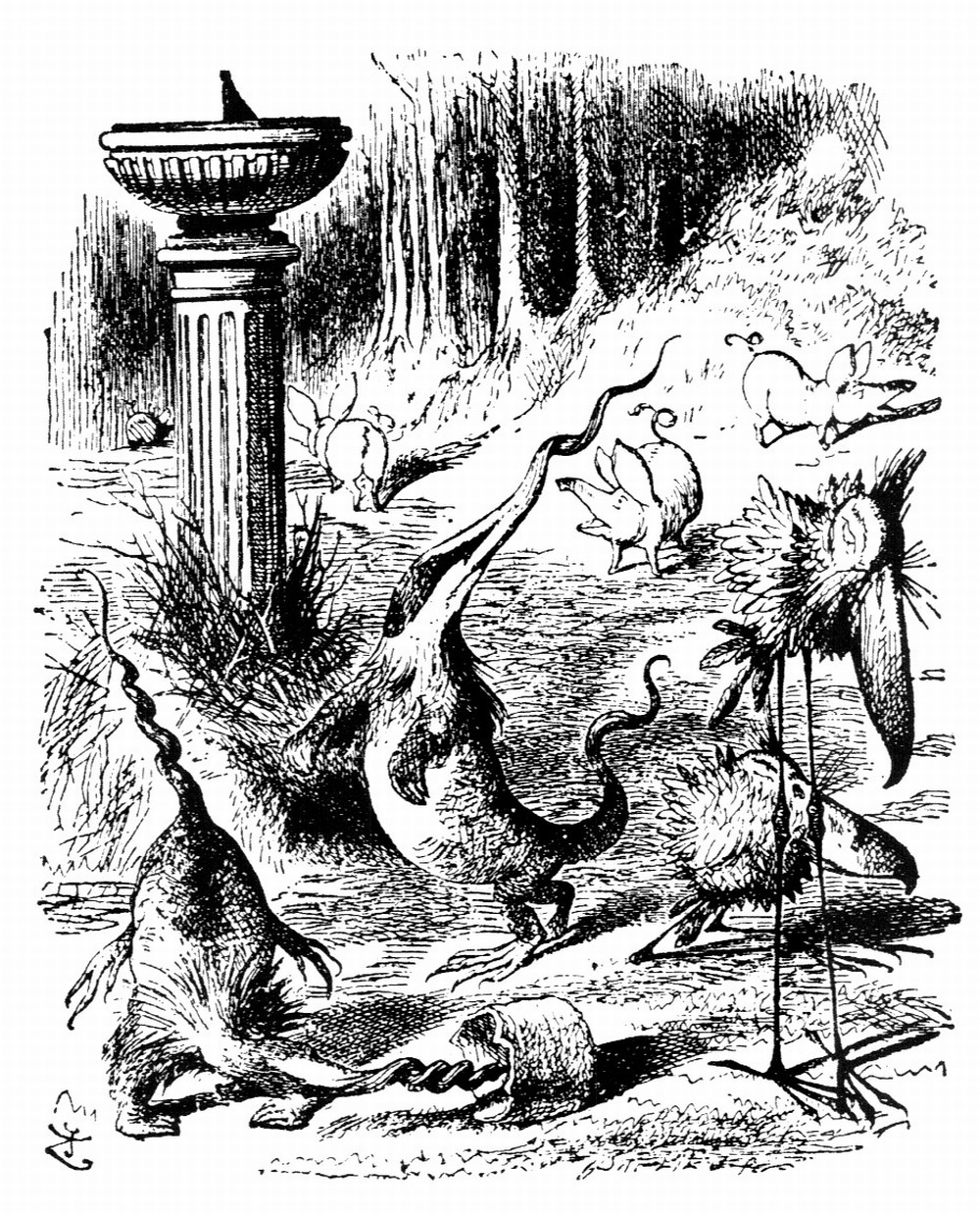 гравюра Джона Тенниела